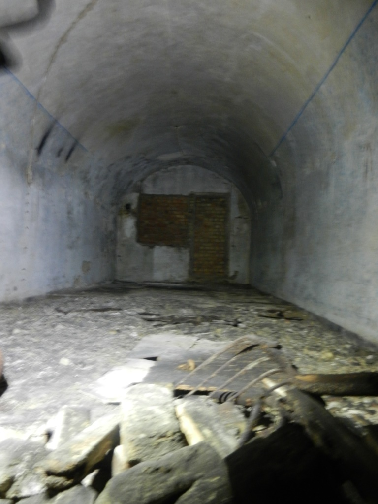 Der Verein "Mainzer Unterwelten" organisierte am 20. Dezember 2014 eine Besichtigung der erhaltenen und heute unter der Erdoberfläche befindlichen Räume des Fort Hartenberg, welche normalerweise nicht öffentlich zugänglich sind und sich auf einer Fläche von ca. 27 m x 17 m unter dem Hauptweg des Hartenberg-Parks erstrecken. Viele der Räume wurden nach 1945 als Notwohnungen genutzt, was sich bis heute in den unterschiedlichen Bemalungen der Wände zeigt. Die oberen Stockwerke des Forts wurden beim Bau der Grundschule um 1966 abgetragen, die unteren wurden zugemauert und zugeschüttet.